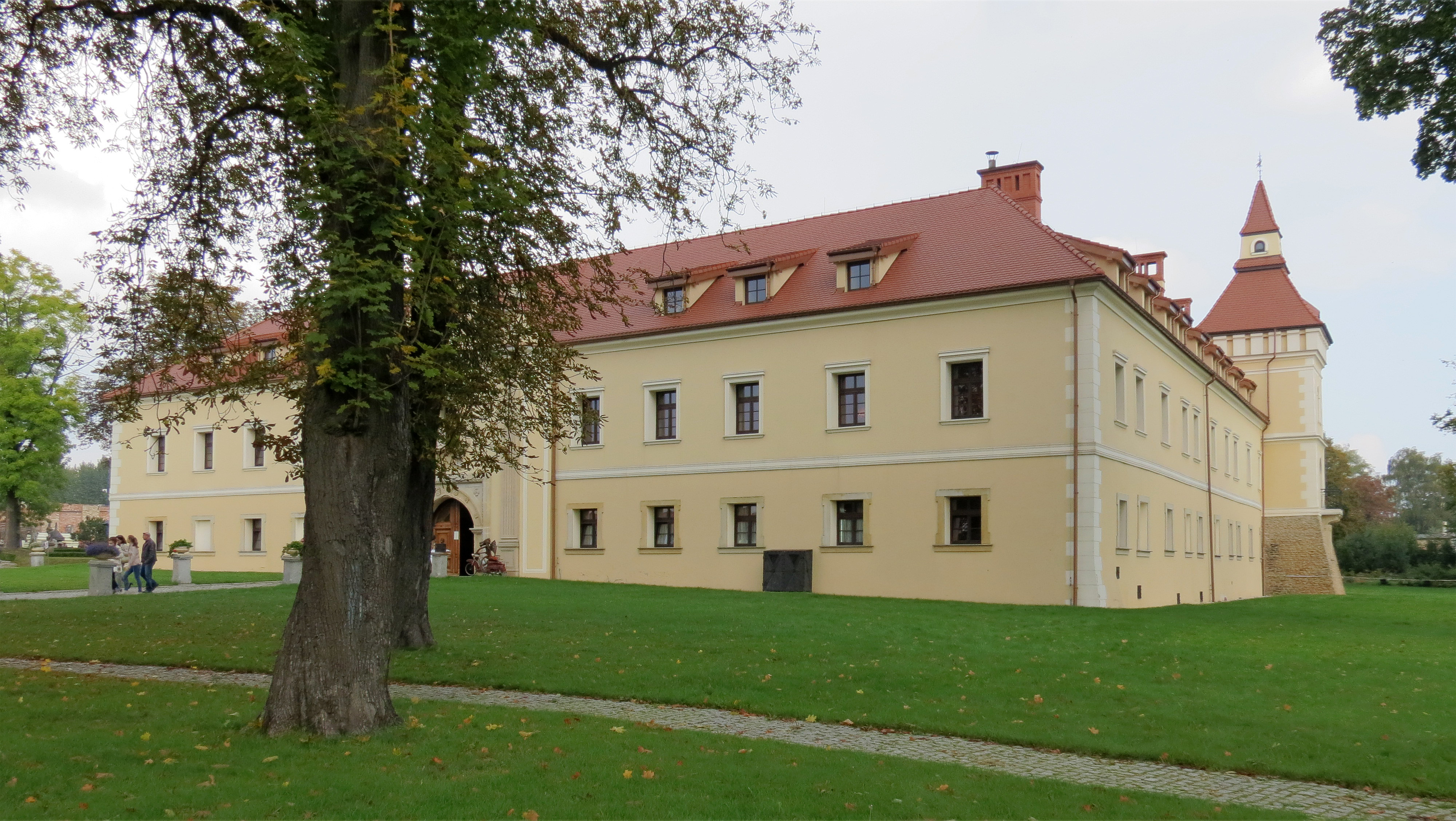 Tarnowskie Góry, zamek, XVI w.